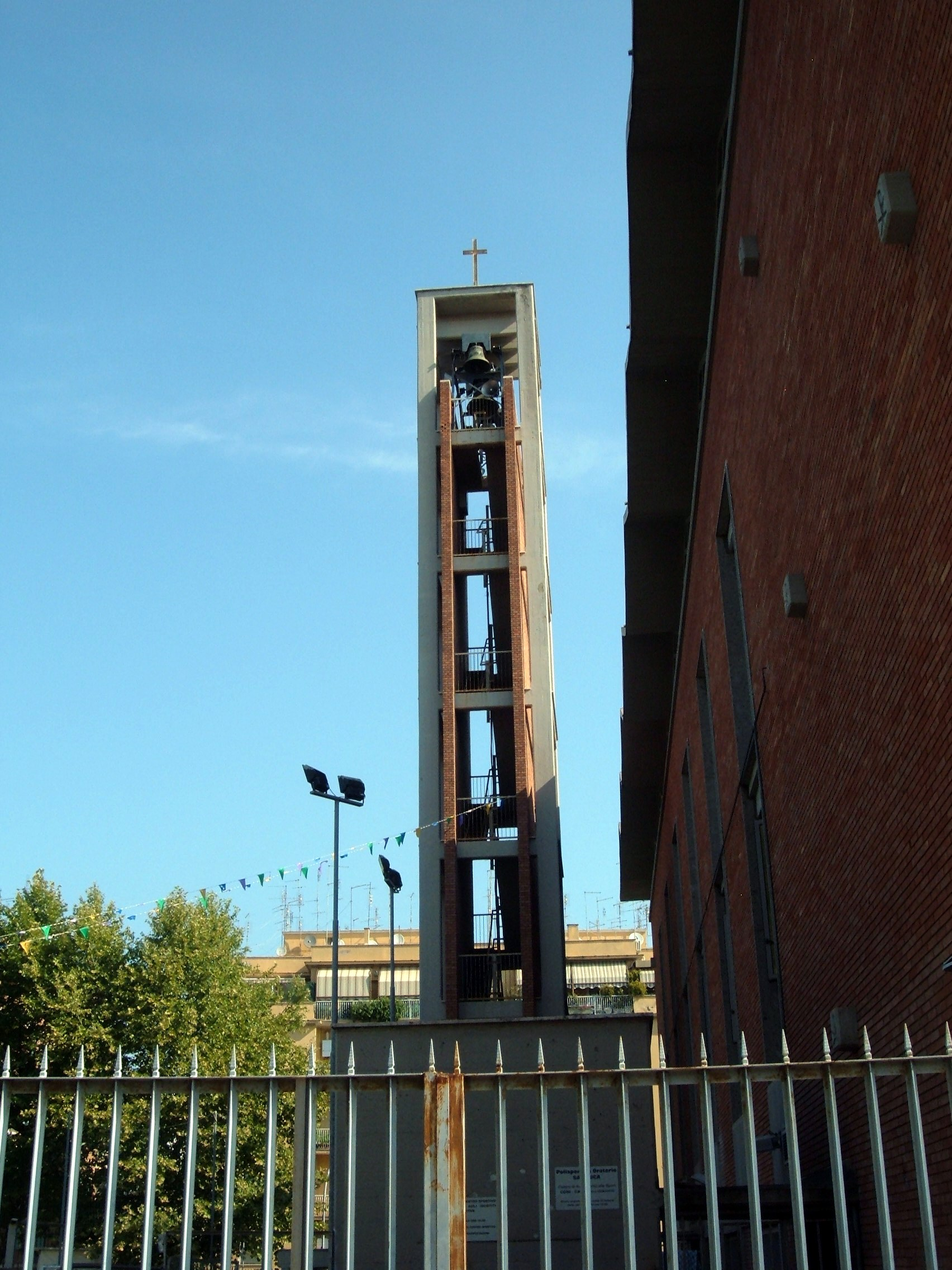 Chiesa di San Luca evangelista, a Roma, nel quartiere Prenestino-Labicano. Campanile.